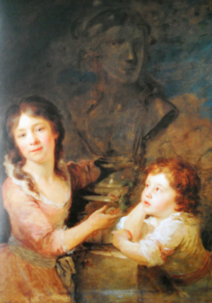 Giovan Battista Lampi “Ritratto di due bambine di casa Tomatis presso un busto” (1788-1789), olio su tela, cm 98 × 80 Vienna, Osterreichische Galerie Belvedere, inv. 2428.